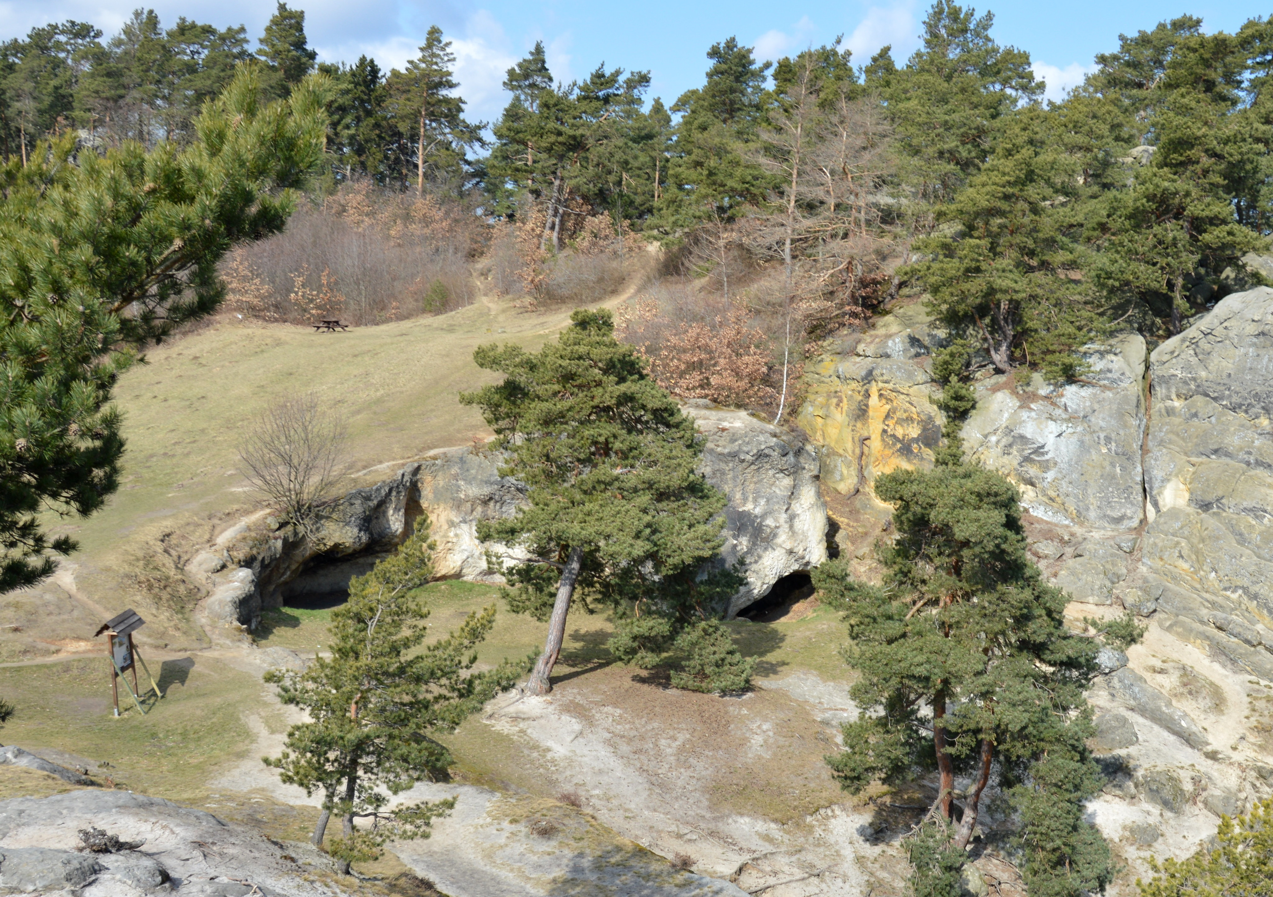 Kuhställe an den Drei Zinnen